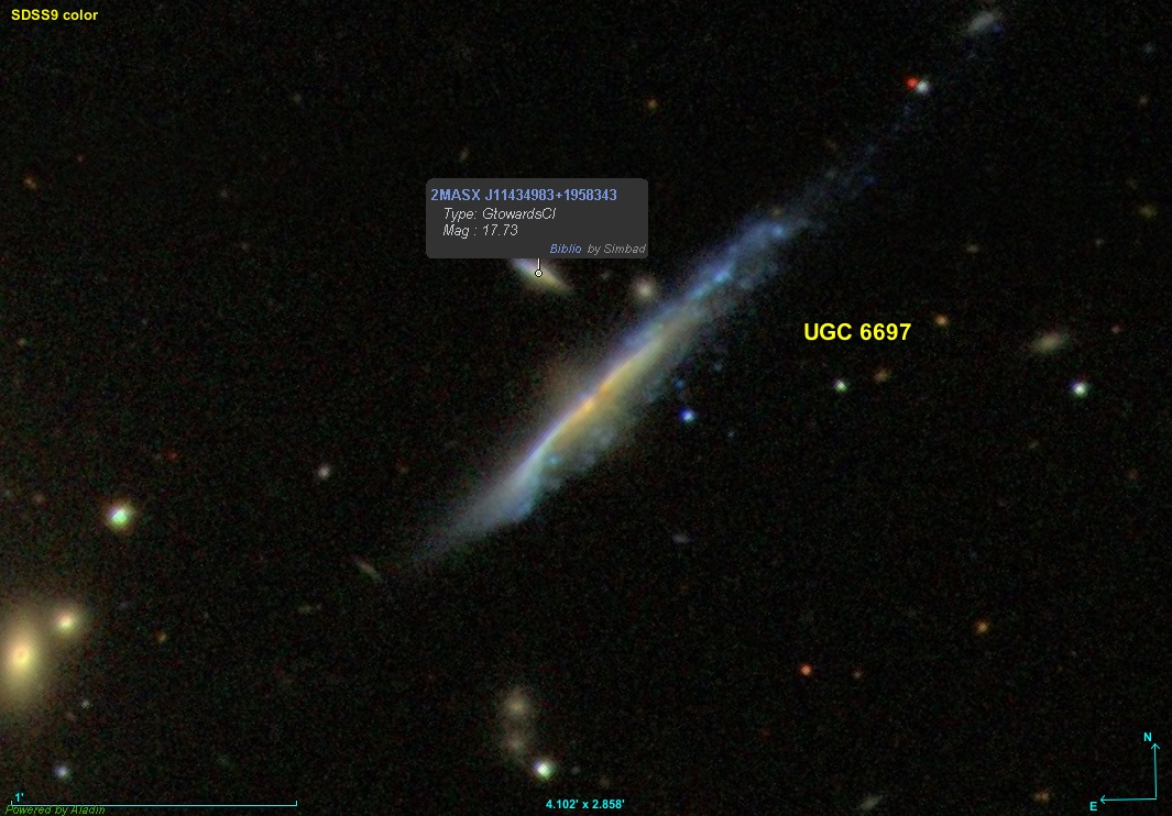 Réalisée avec Aladin et les données SDSS